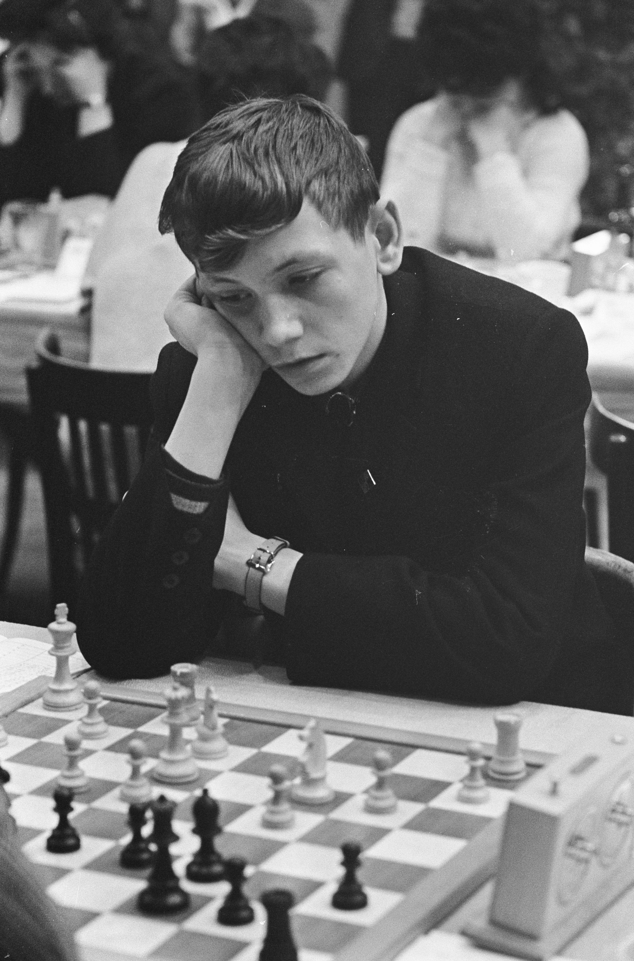 Collectie / Archief : Fotocollectie Anefo Reportage / Serie : [ onbekend ] Beschrijving : Hoogovenschaaktoernooi, de 15-jarige Russische meester J. S. Balasjov Datum : 12 januari 1965 Trefwoorden : schaken Persoonsnaam : J. S. Balasjov Instellingsnaam : Hoogovenschaaktournooi Fotograaf : Koch, Eric / Anefo Auteursrechthebbende : Nationaal Archief Materiaalsoort : Negatief (zwart/wit) Nummer archiefinventaris : bekijk toegang 2.24.01.05 Bestanddeelnummer : 917-3290